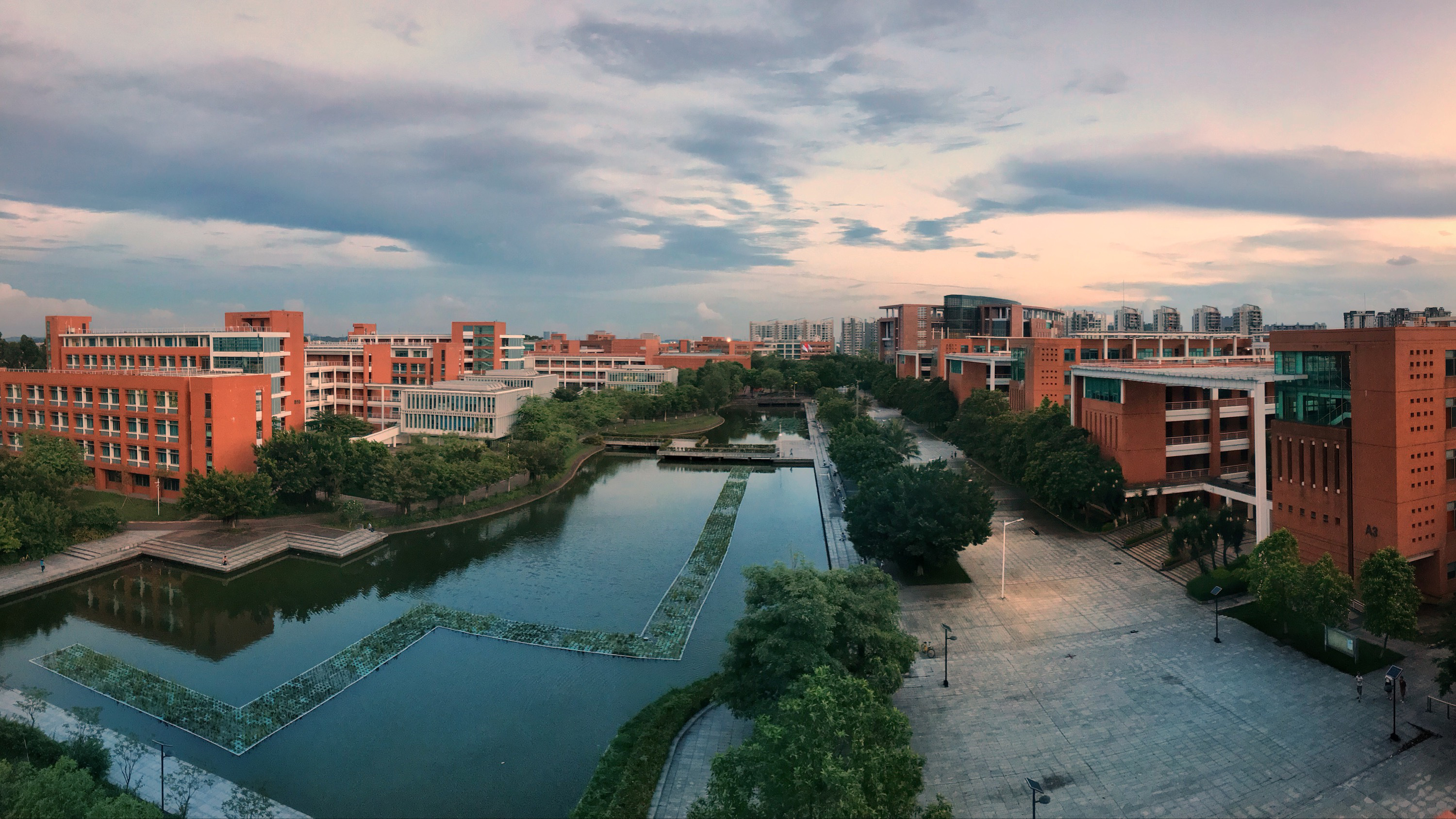 华南理工大学大学城校区教学区